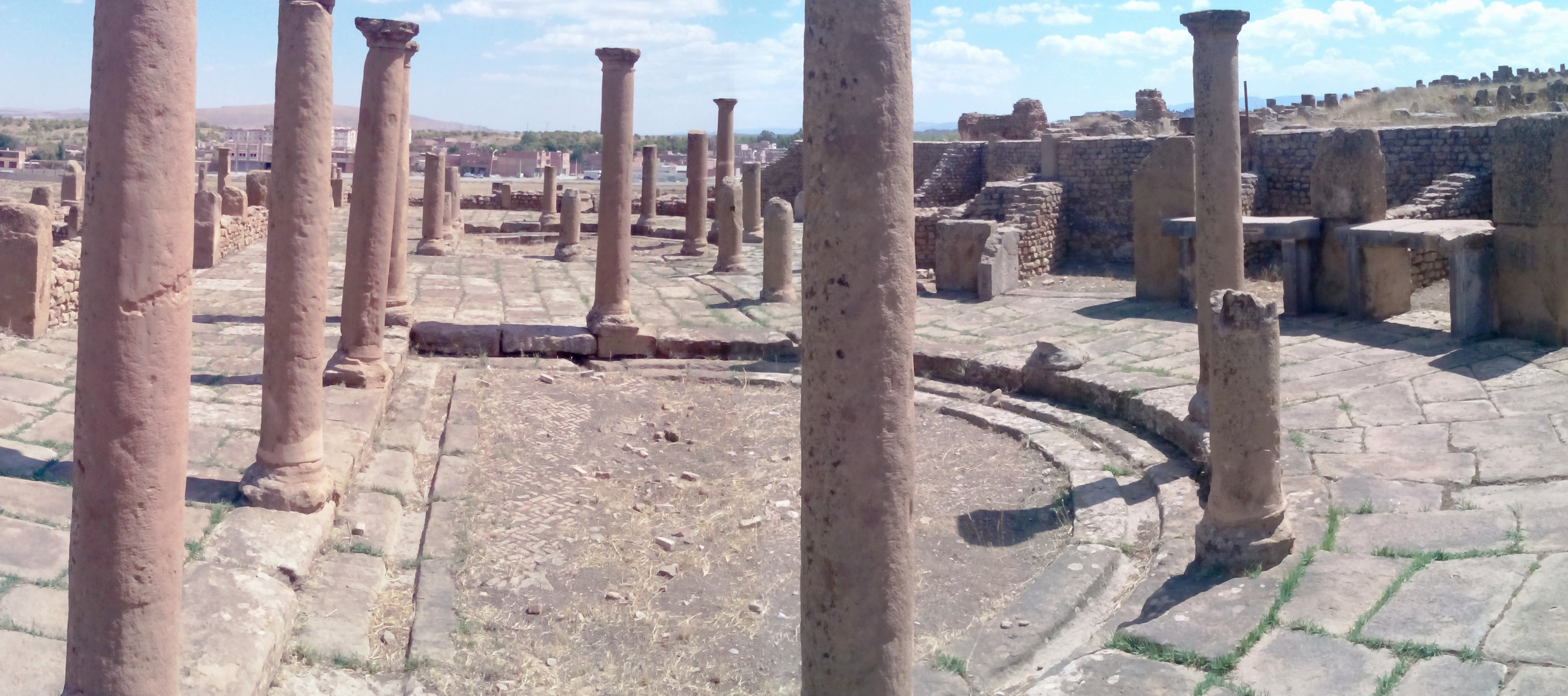 Territoires et monuments de l'antique Thamugadi.